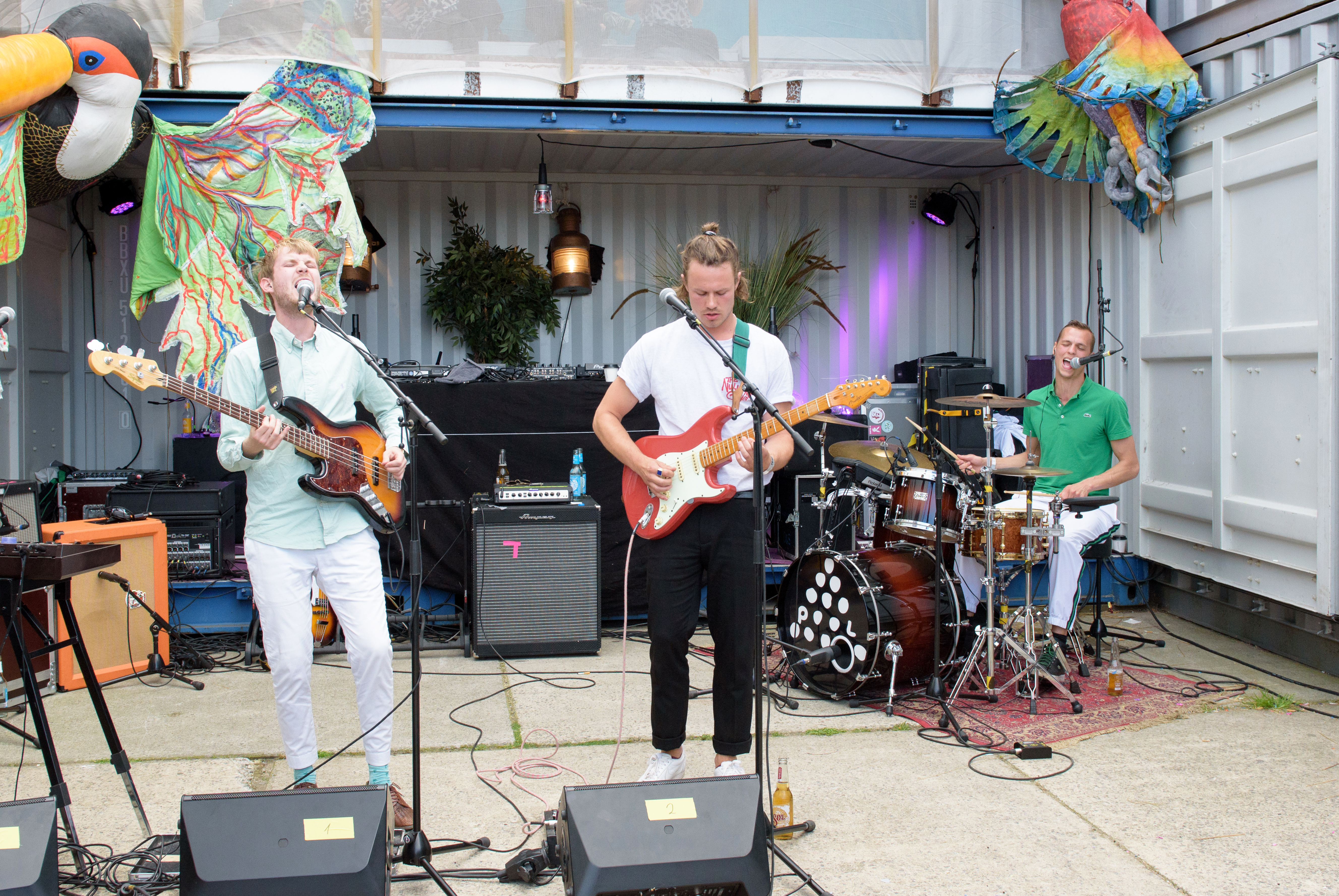 Pool beim Surf & Skate Festival in Hamburg 2017